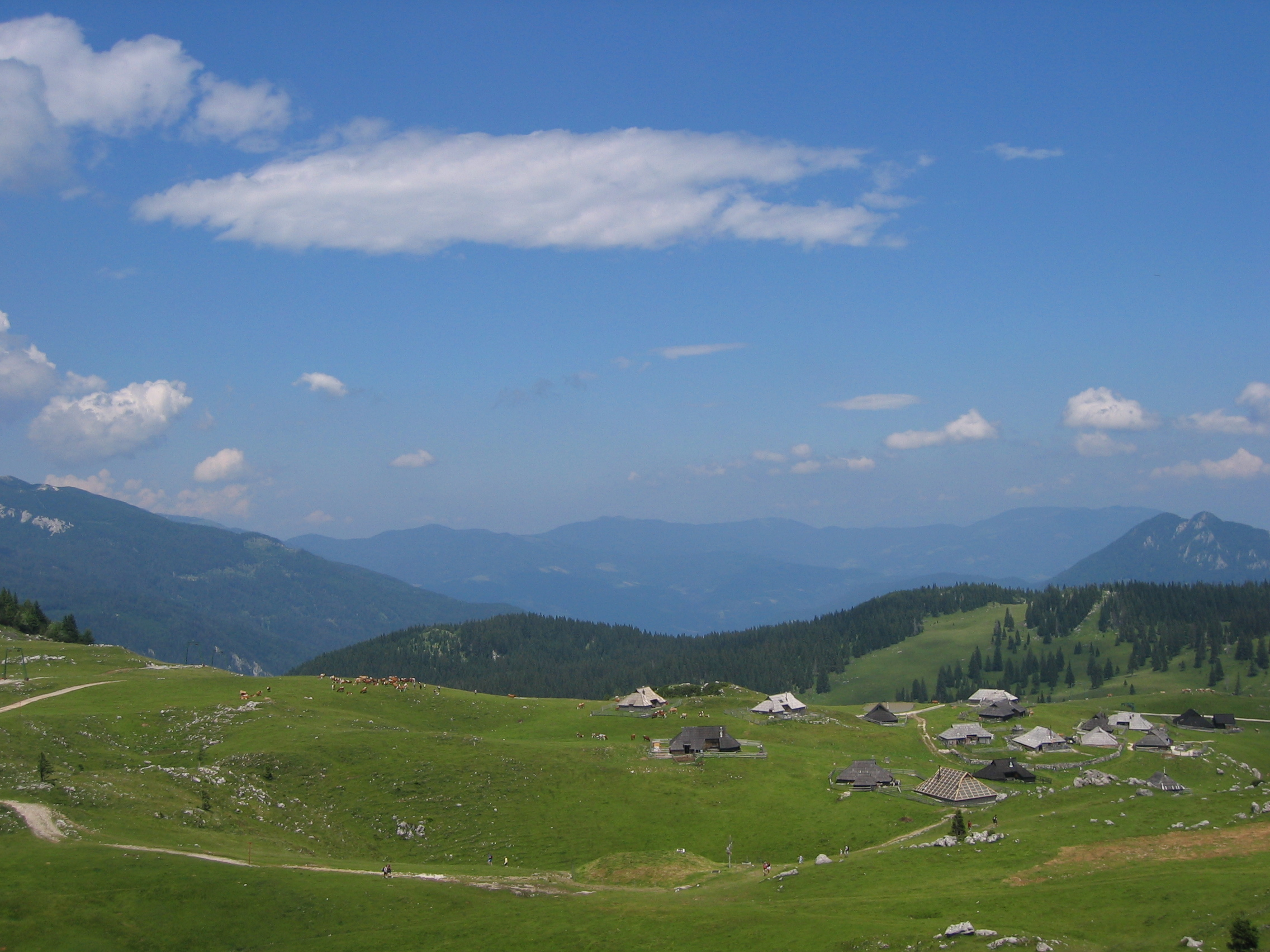 Poleti je na Veliki planini še vedno pomembno pašništvo, zlasti goveda.